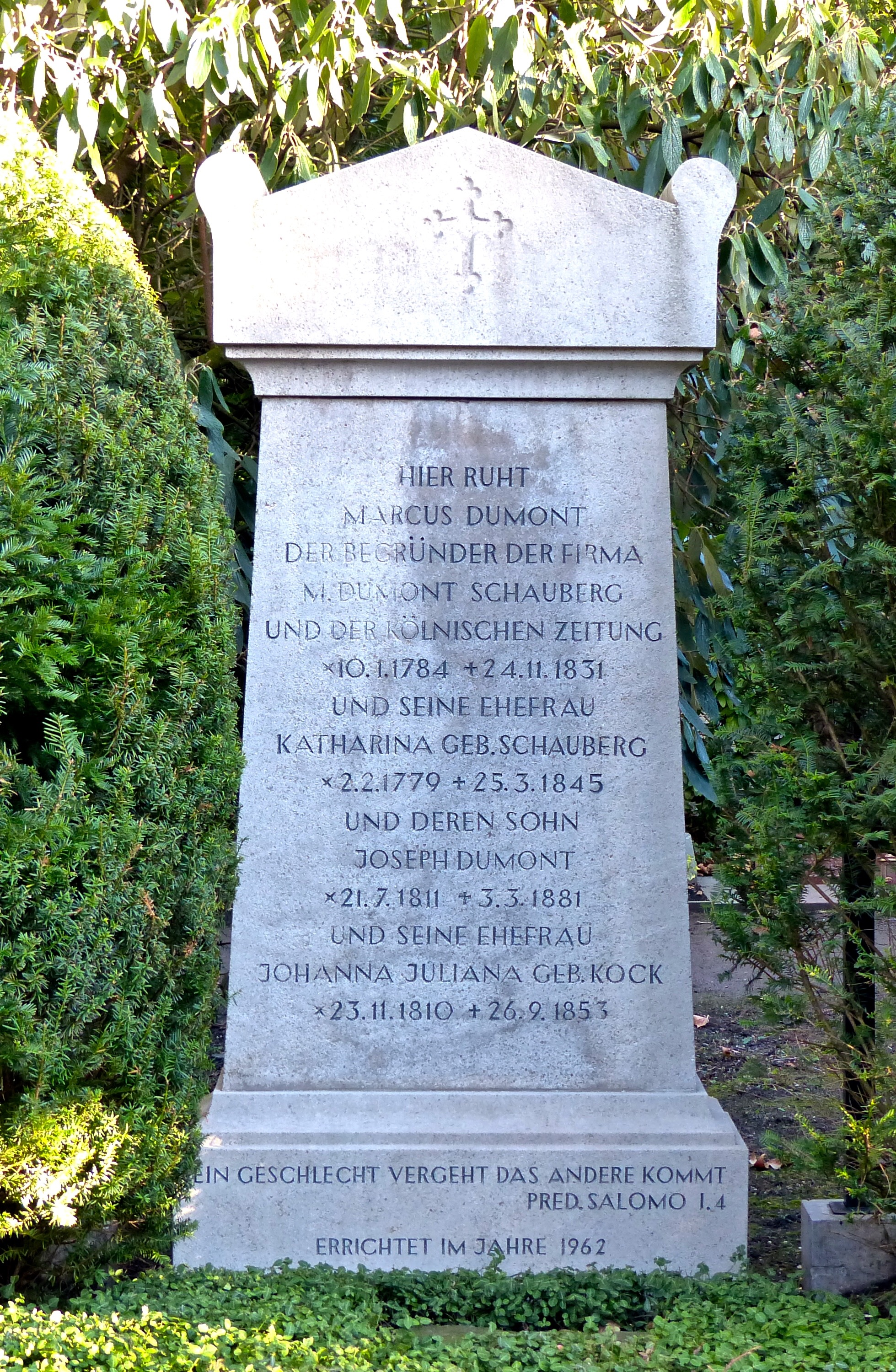 Friedhof Melaten: Grabstein (nach dem Zweiten Weltkrieg errichtet) auf dem Familiengrab von DuMont: Marcus DuMont, Joseph DuMont, Katarina Dumont, HWG (zw. Lit. A und Lit. B)